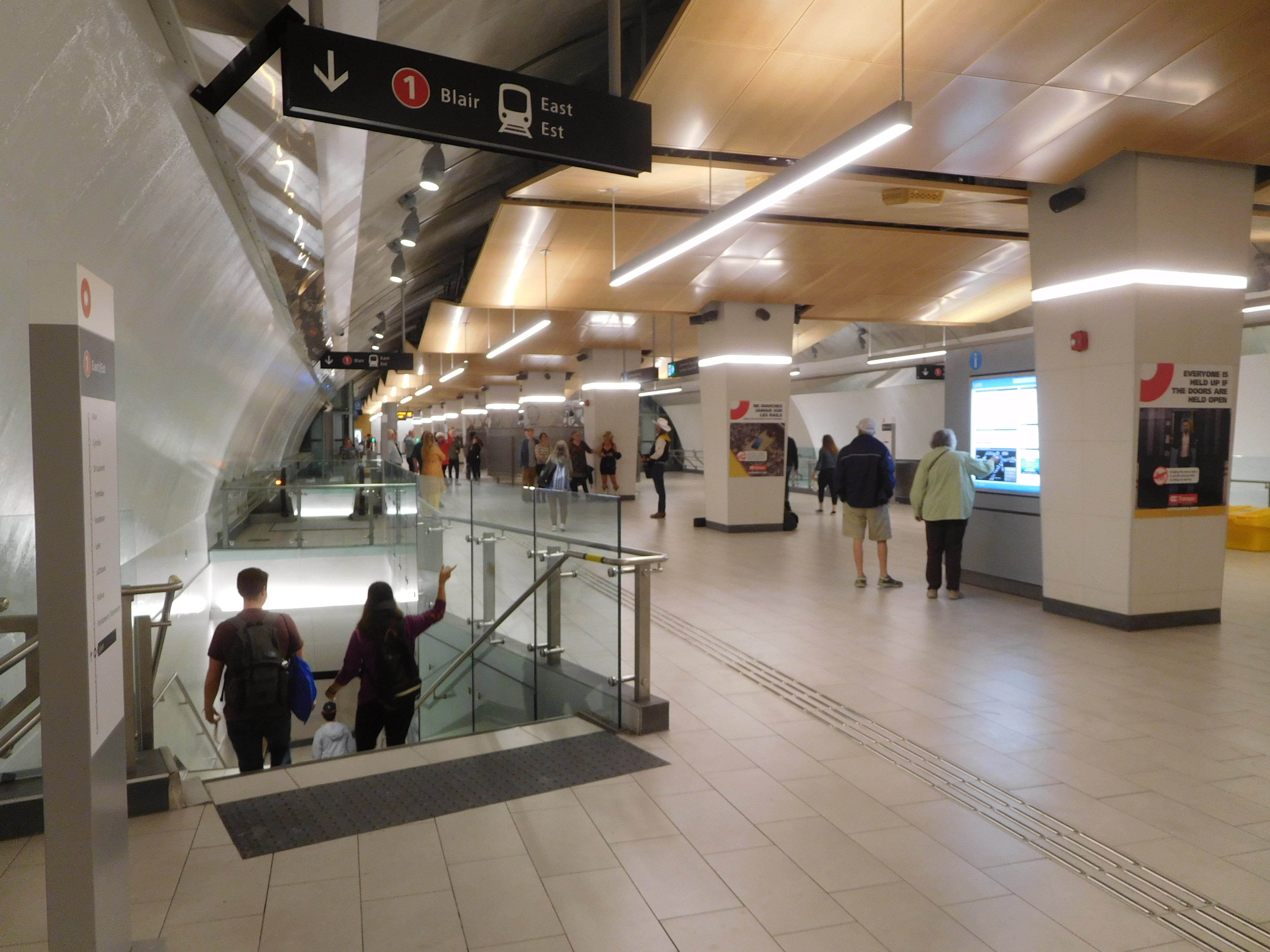 À l'intérieur de la station Lyon